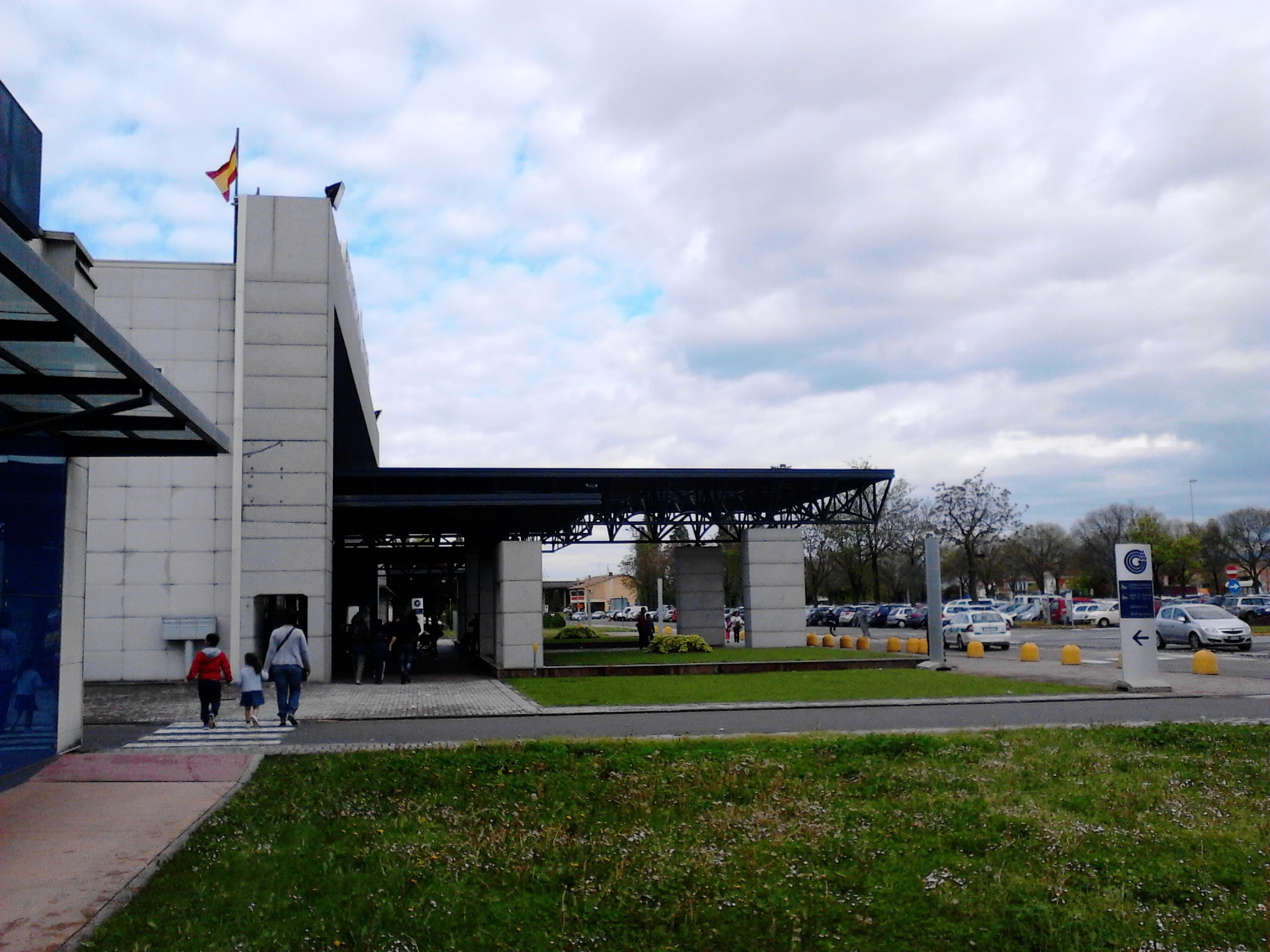 Fiera del Garda a Montichiari ITALIA